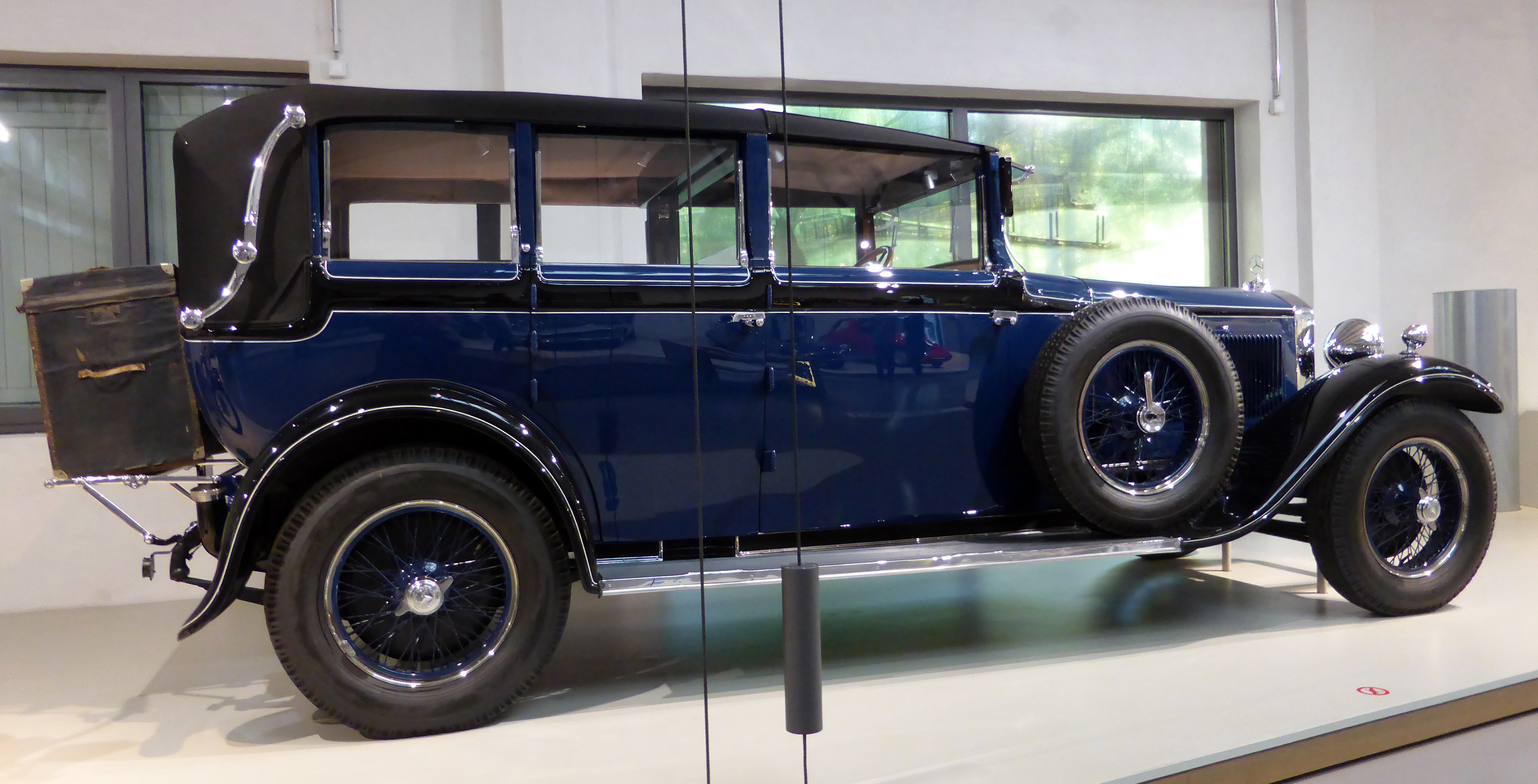 Mercedes-Benz Typ Nürburg 460, Baujahr 1929. Entwurf: Ferdinand Porsche. Karosserie: Pullmann-Transformations-Kabriolett von Erdmann & Rossi. Ausgestellt im Deutschen Technikmuseum in Berlin. Wikipedianische KulTour am 10. Oktober 2015 in der Ausstellung des Museums.